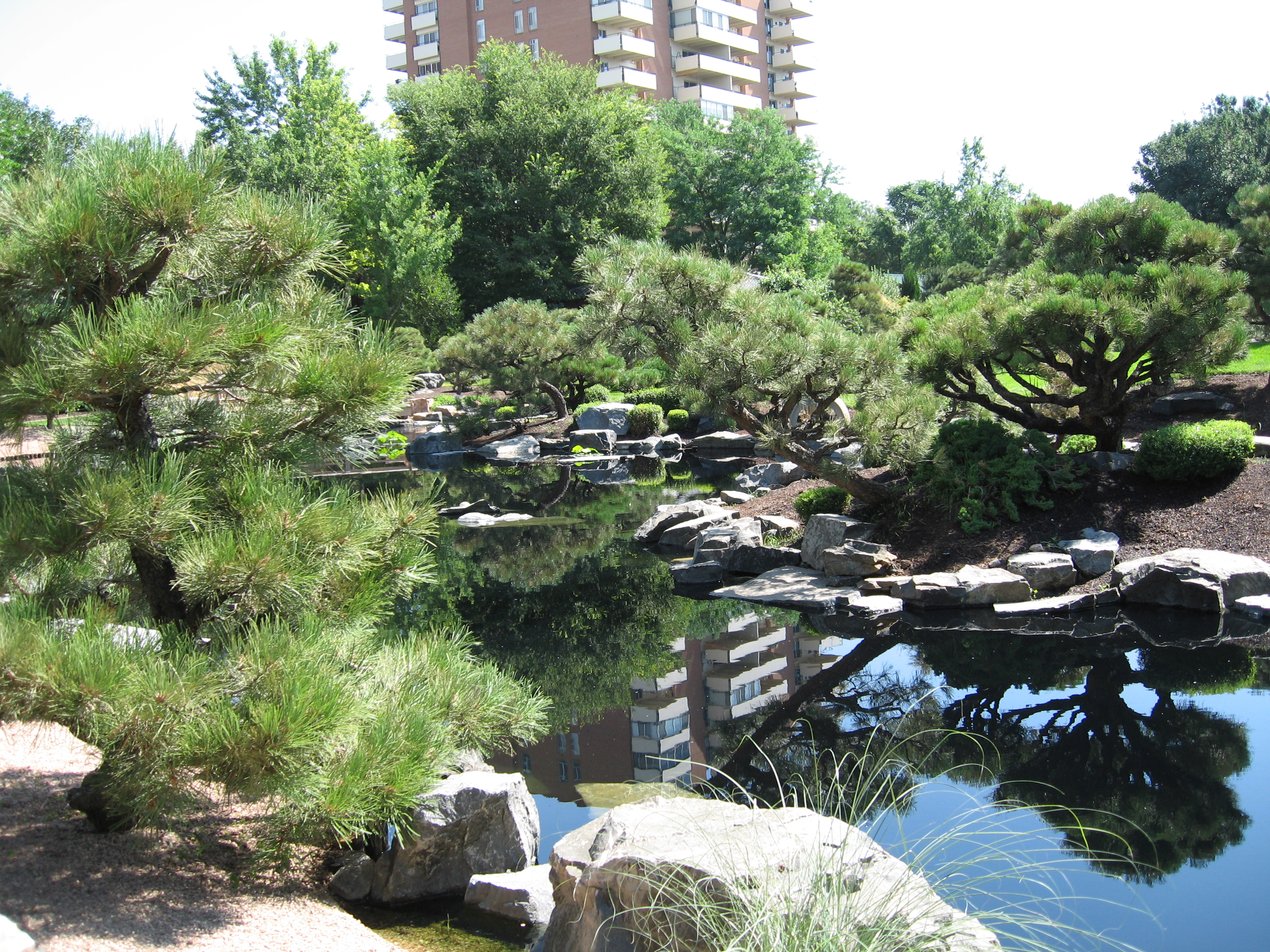 Japanese Garden at Denver Botanic Gardens